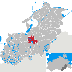 Blankensee in Mecklenburg-Vorpommern, Landkreis Mecklenburg-Strelitz